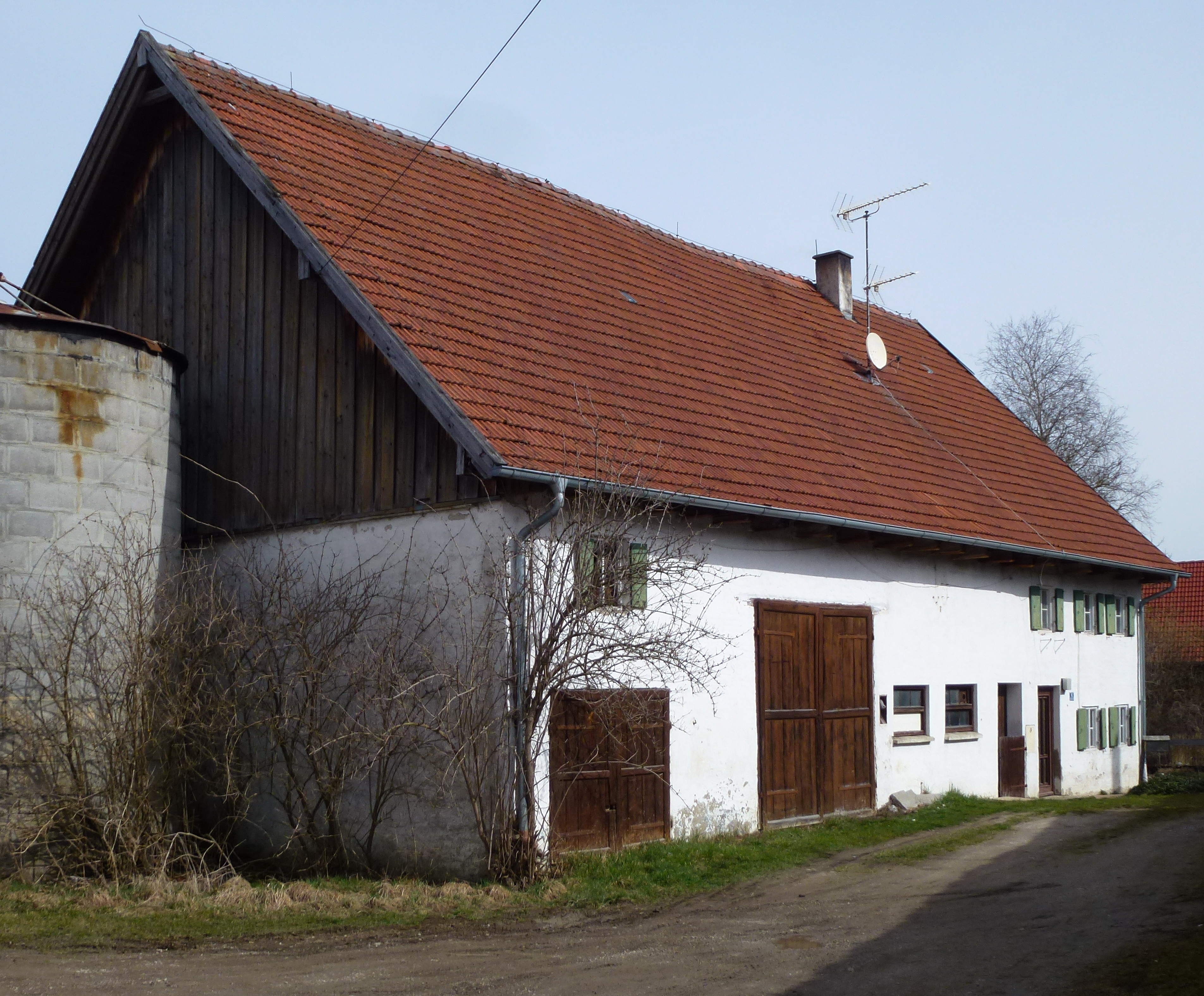 Windach, Burgleitenstr. Nr . 6 Bauernhaus, Ansicht von SW